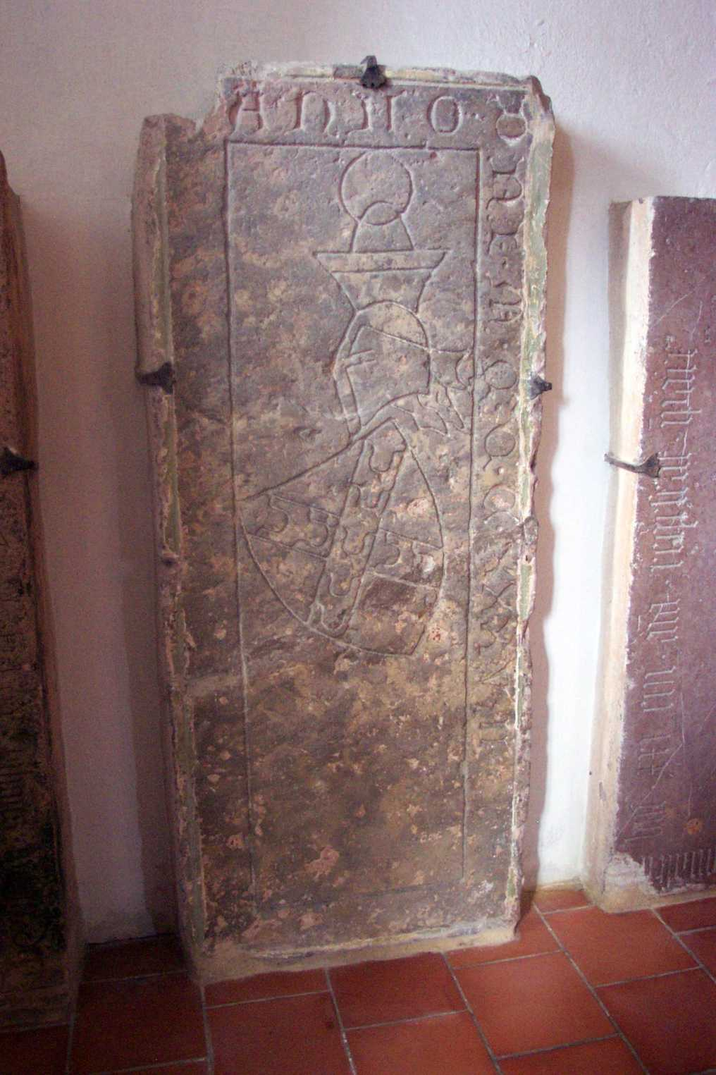 Grabmal Seyfried Schweppermanns in der Klosterkirche in Kastl (Oberpfalz/Bayern), Umschrift: ANNO.DNI.M.C.C.C.XXX.VII - Im Hauptfeld das Wappen der Familie Schweppermann: In Rot weißes Andreaskreuz, belegt mit Eisenhutfeh